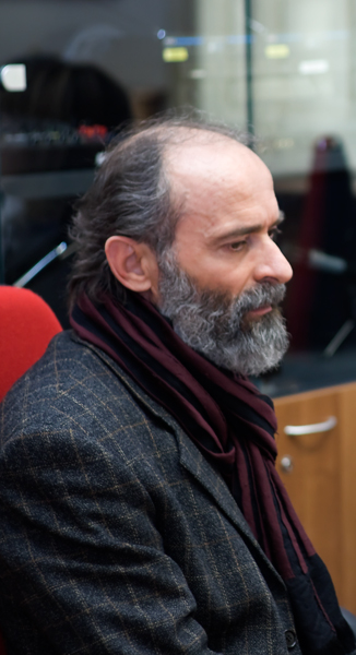 Gezim Hajdari.